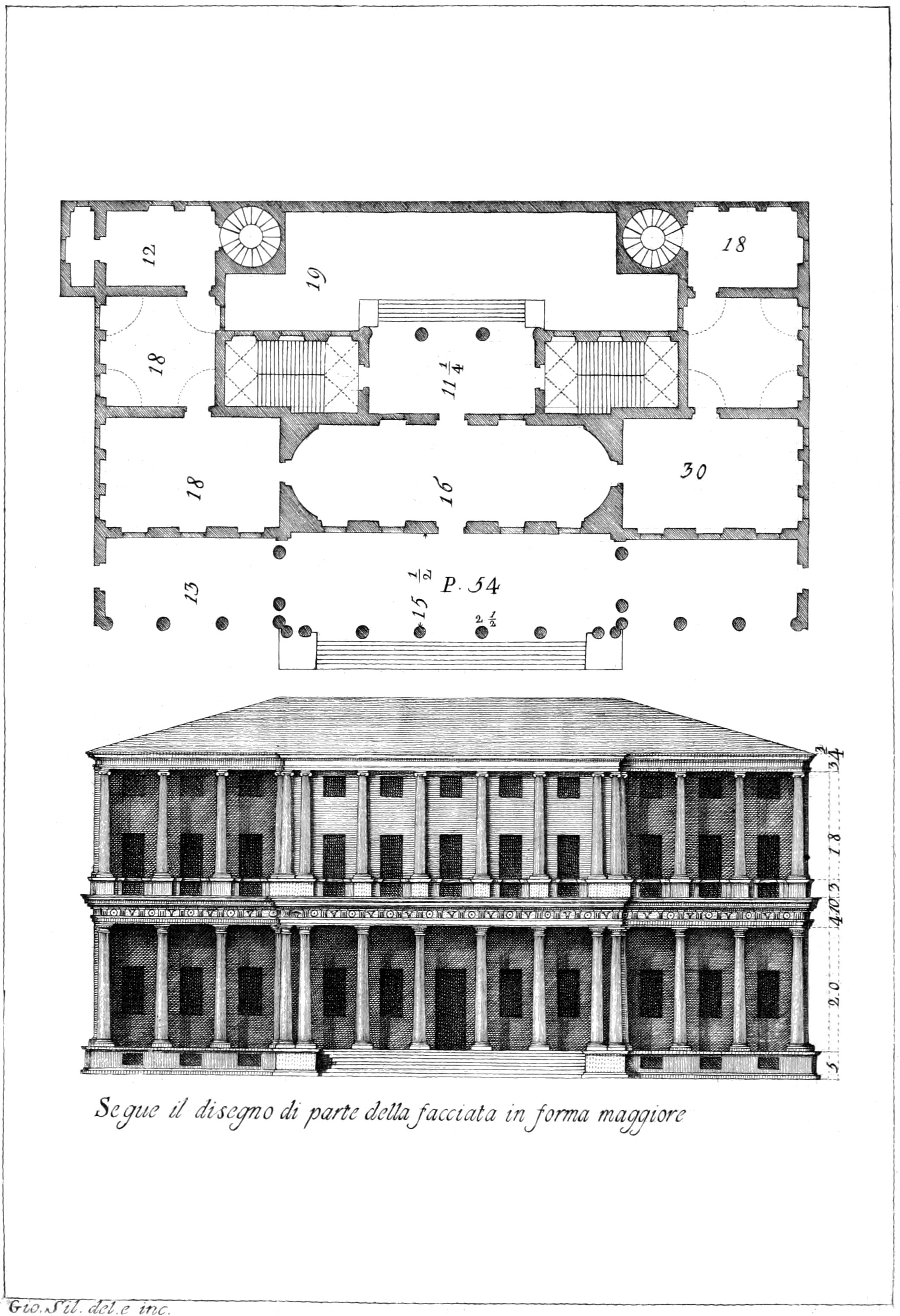 Immagine di pagina 8 Libro II